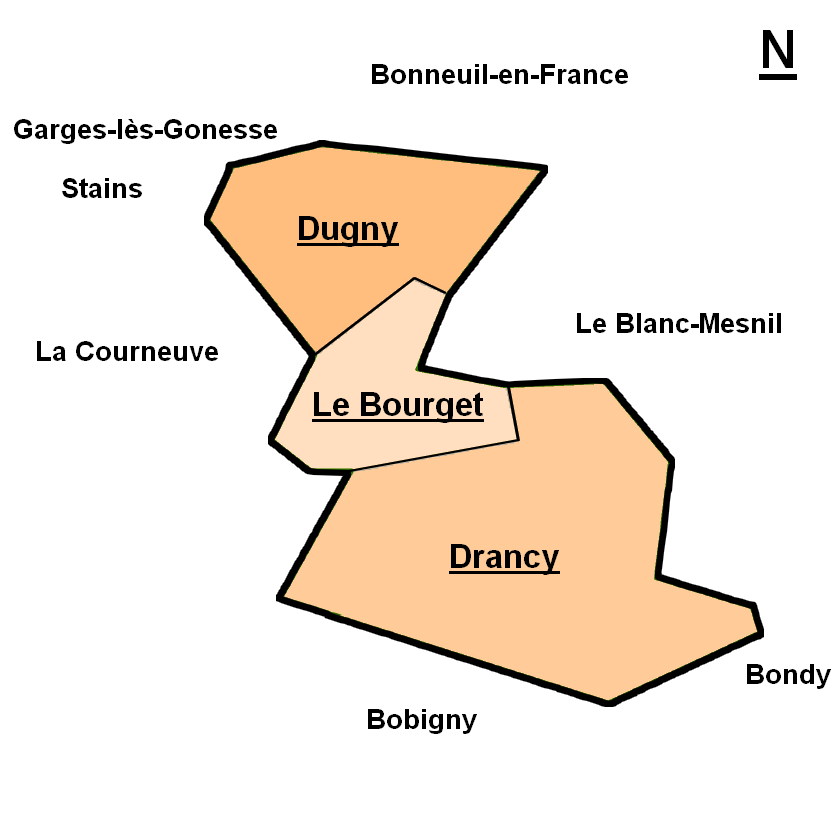 Schéma de la Communauté d'agglomération de l'aéroport du Bourget et nom des communes limitrophes